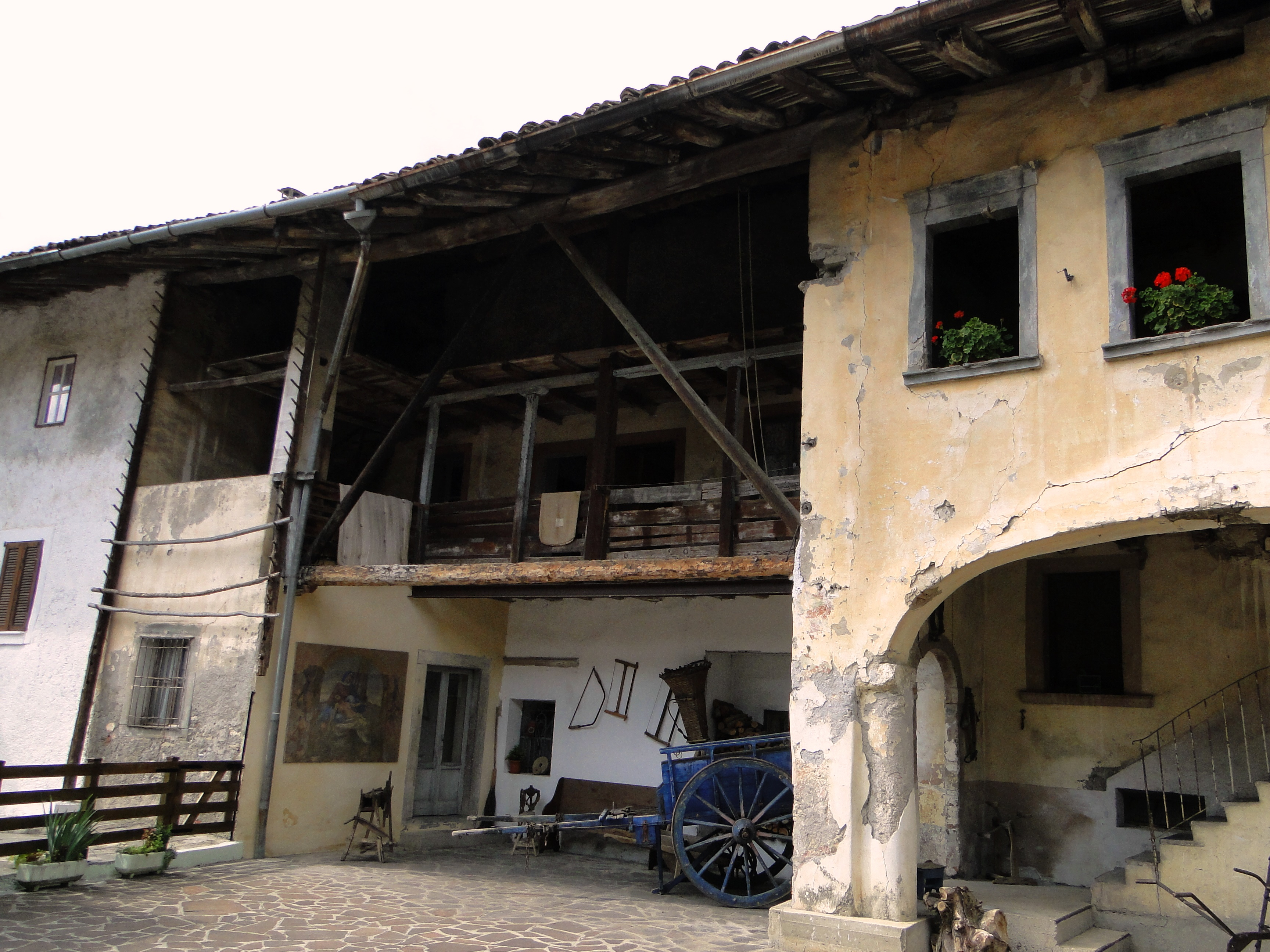 Piario (BG). Edificio rustico